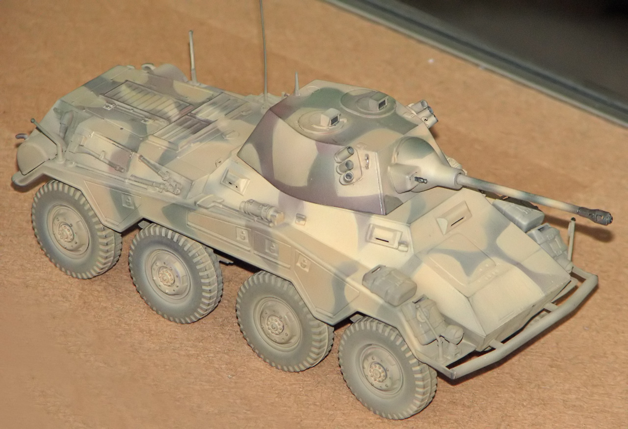 Dieses Bild zeigt ein Modell des Sd.Kfz. 234/2 "Puma" mit 50 mm L/60 KwK.